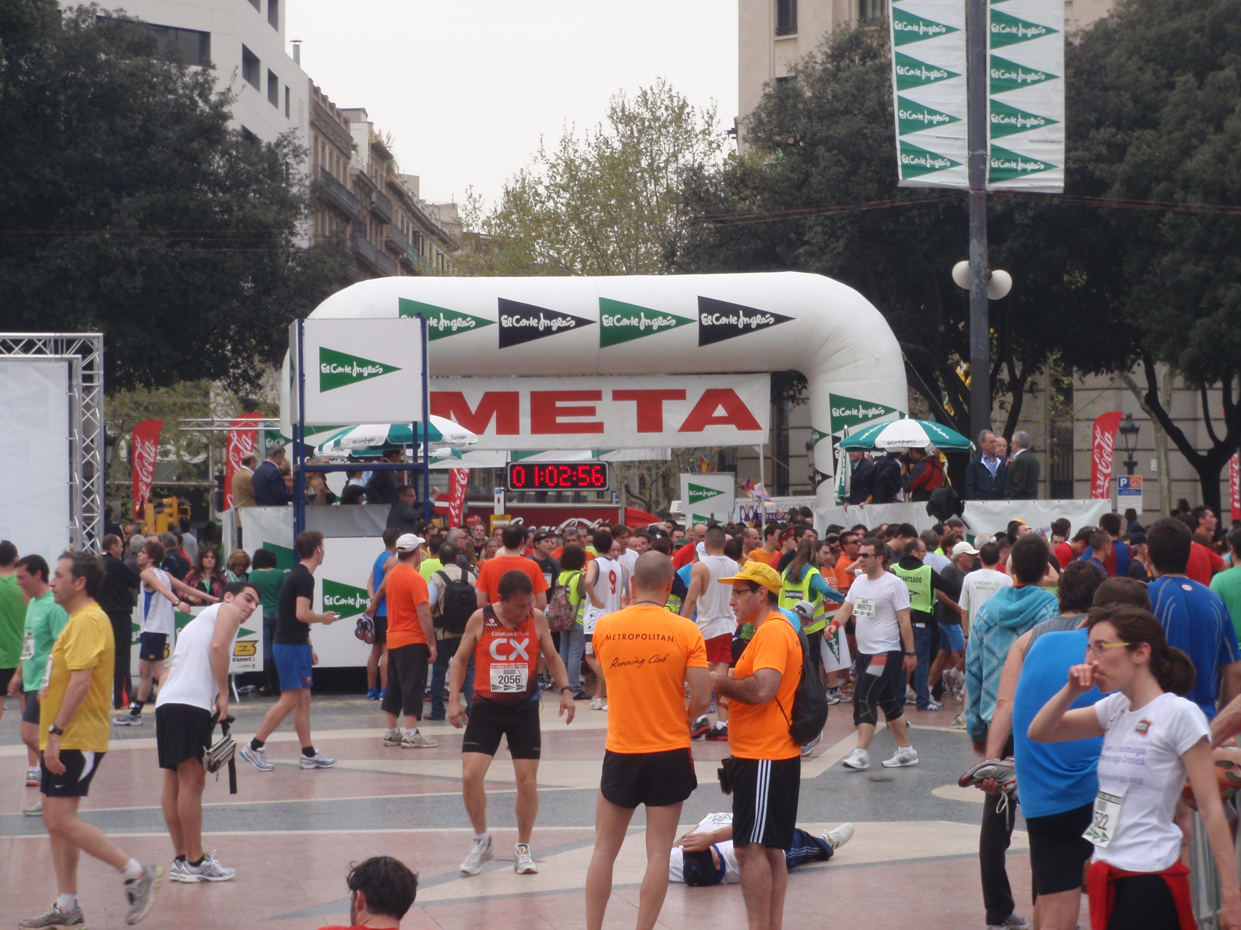 Cursa El Corte Inglés 2011, arrival in Plaça Catalunya